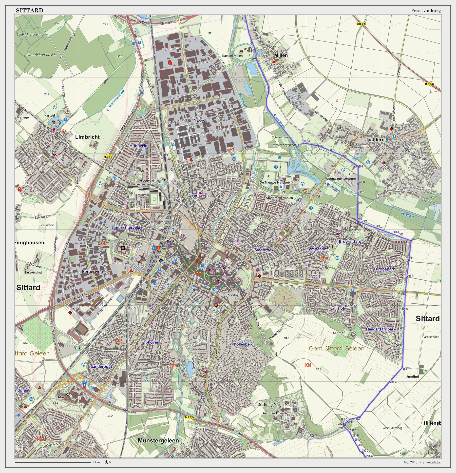 Topografische kaart van Sittard (woonplaats). Kaartbeeld samengesteld op basis van de GML open geodata van de Top10NL en Top25namen (Basisregistratie Topografie, Kadaster 30-nov-2013), o.b.v. Creative Commons BY licentie. Gebouwvlakken uit Open Geodata BAG extract (8-dec-2013). Wegen uit de Open Street Map (15-dec-2013). Samenstelling en kleurenschema: Jan-Willem van Aalst, met QGIS2 en Adobe Photoshop. Zie ook de Legenda.